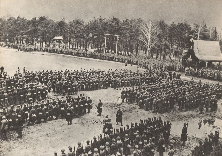 I Brygada Legionów Polskich na placu paradnym w Baranowiczach. 5 listopada 1916 roku.